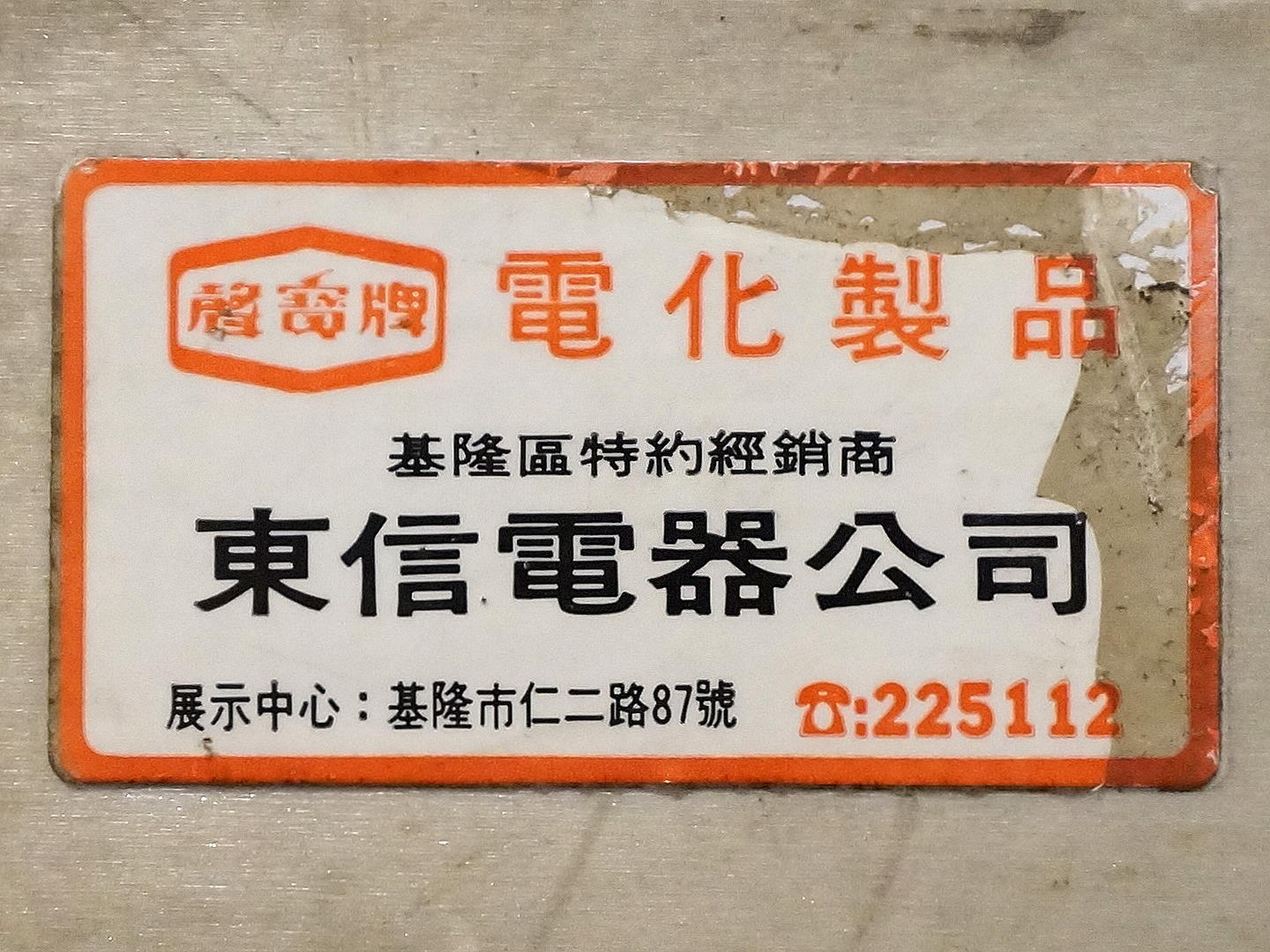 基隆市仁愛區愛三路98巷12號1樓基隆原創服飾大門前，1980年代以前聲寶家電基隆區特約經銷店貼紙。